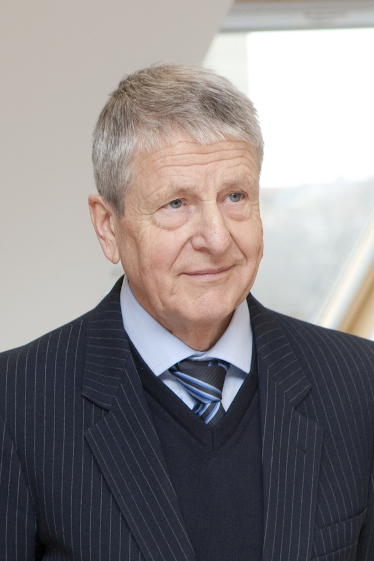 Portrait von Uwe-Frithjof Haustein anlässlich der Emeritierung von Prof. Hans-Jürgen Glander in der Klinik und Poliklinik für Dermatologie, Venerologie und Allergologie Leipzig.